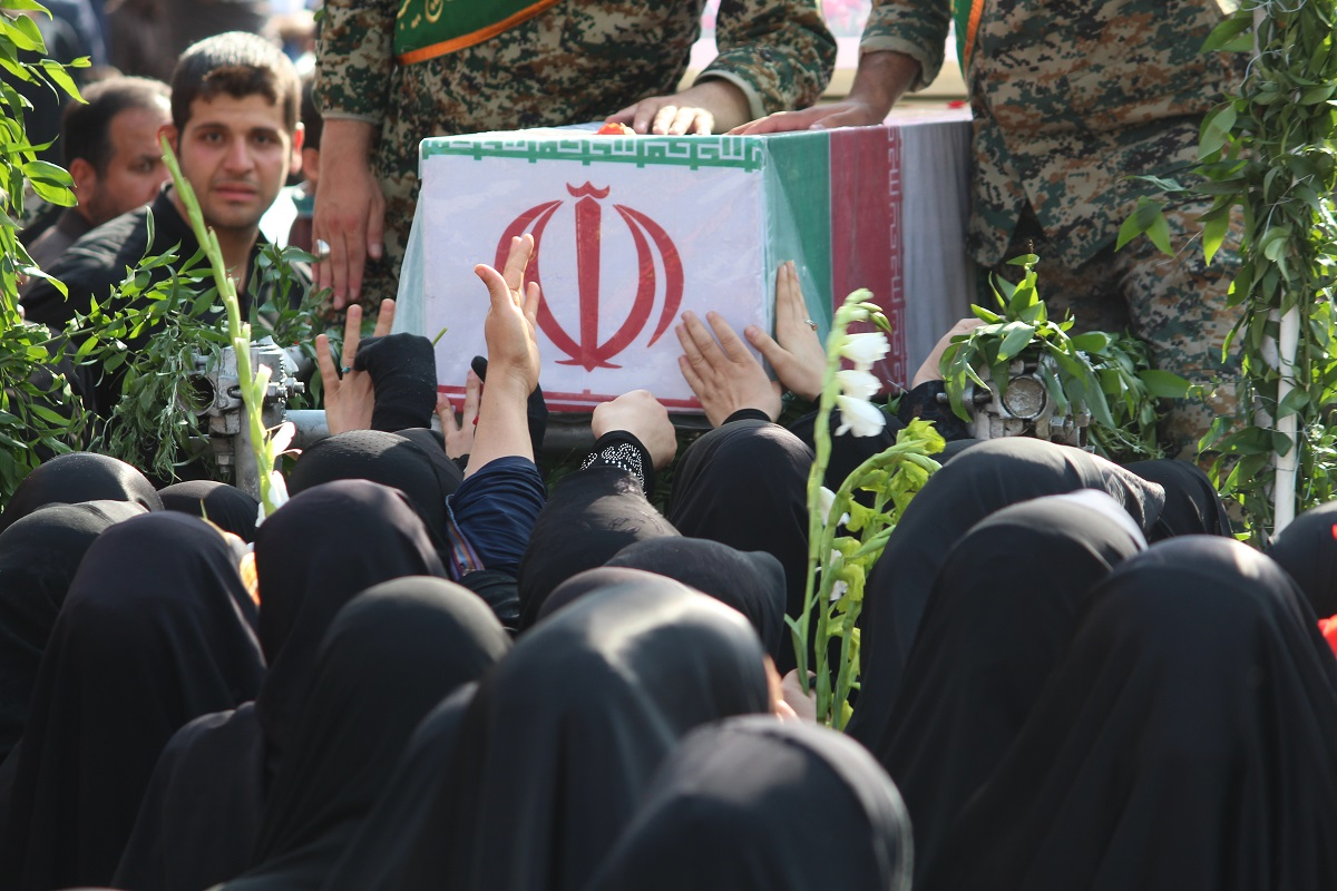 Funeral martyr تشییع شهدای گمنام تهران شهدا تشییع شهید گمنام